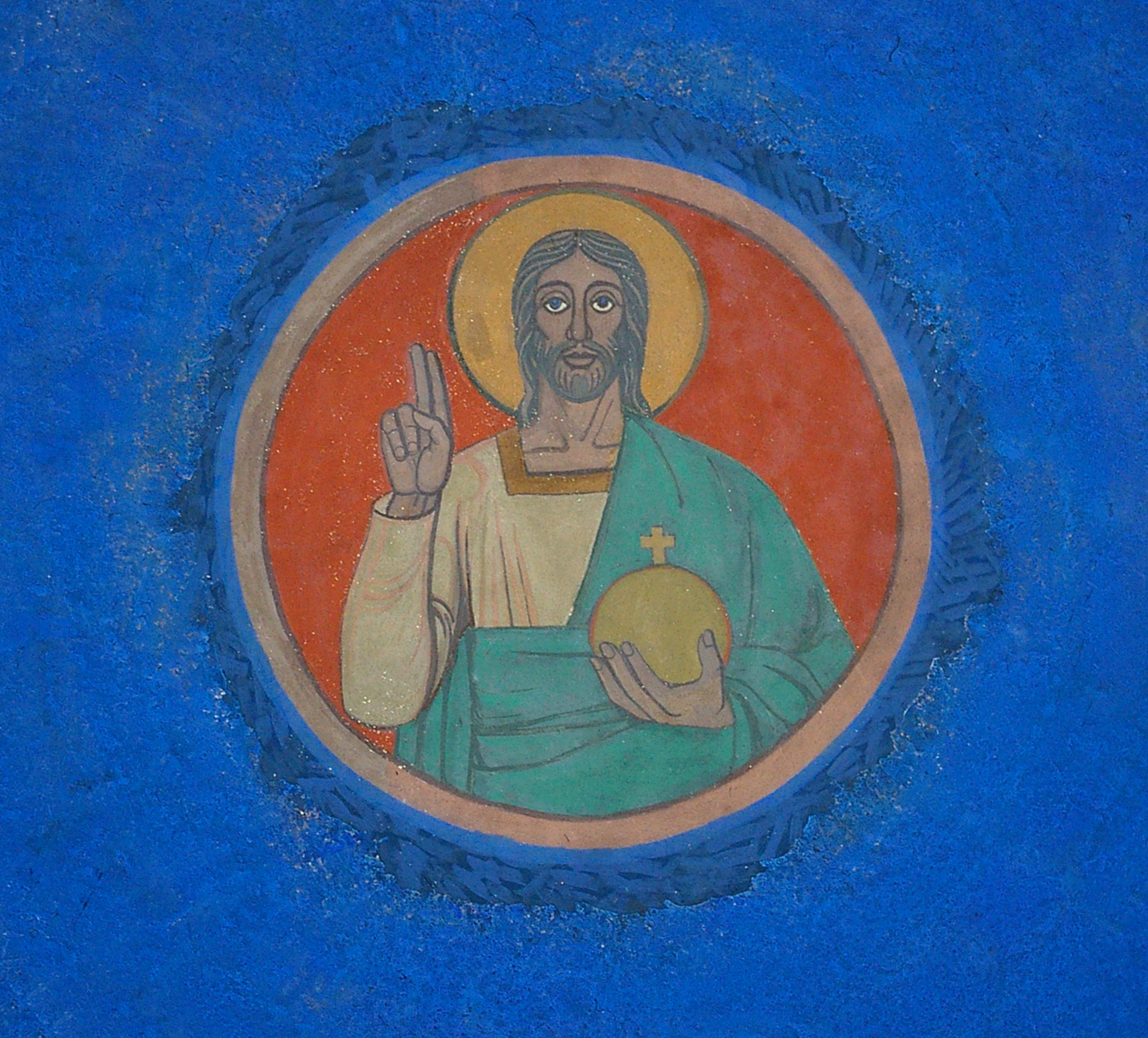 Coupole du file. Photo Bernard FORIEN